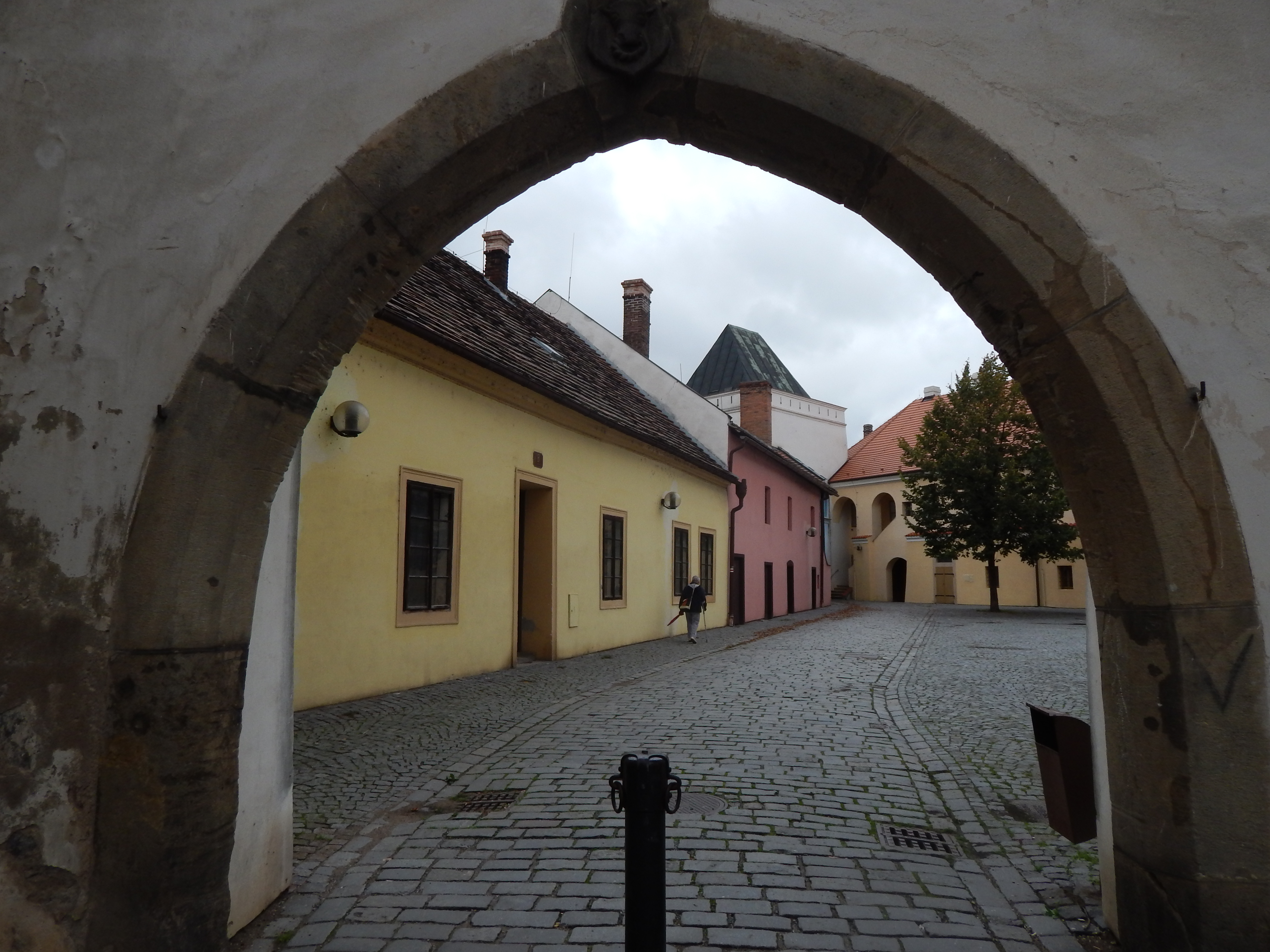 budovy tzv. Příhrádku, Pardubice